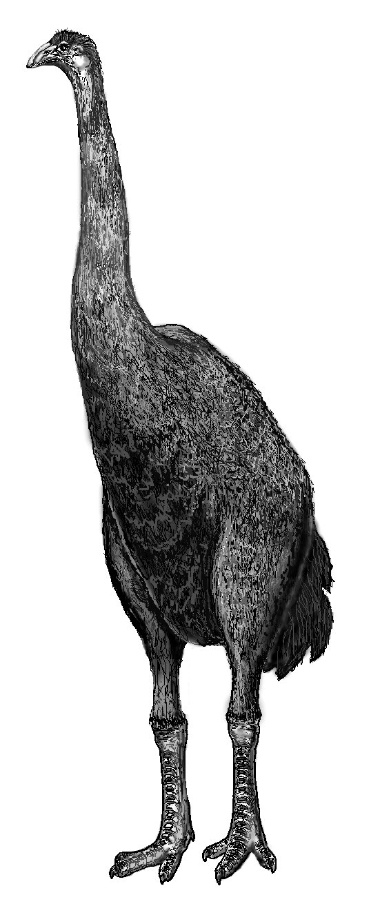 Dinornithidae (Moa), Oiseau disparu.